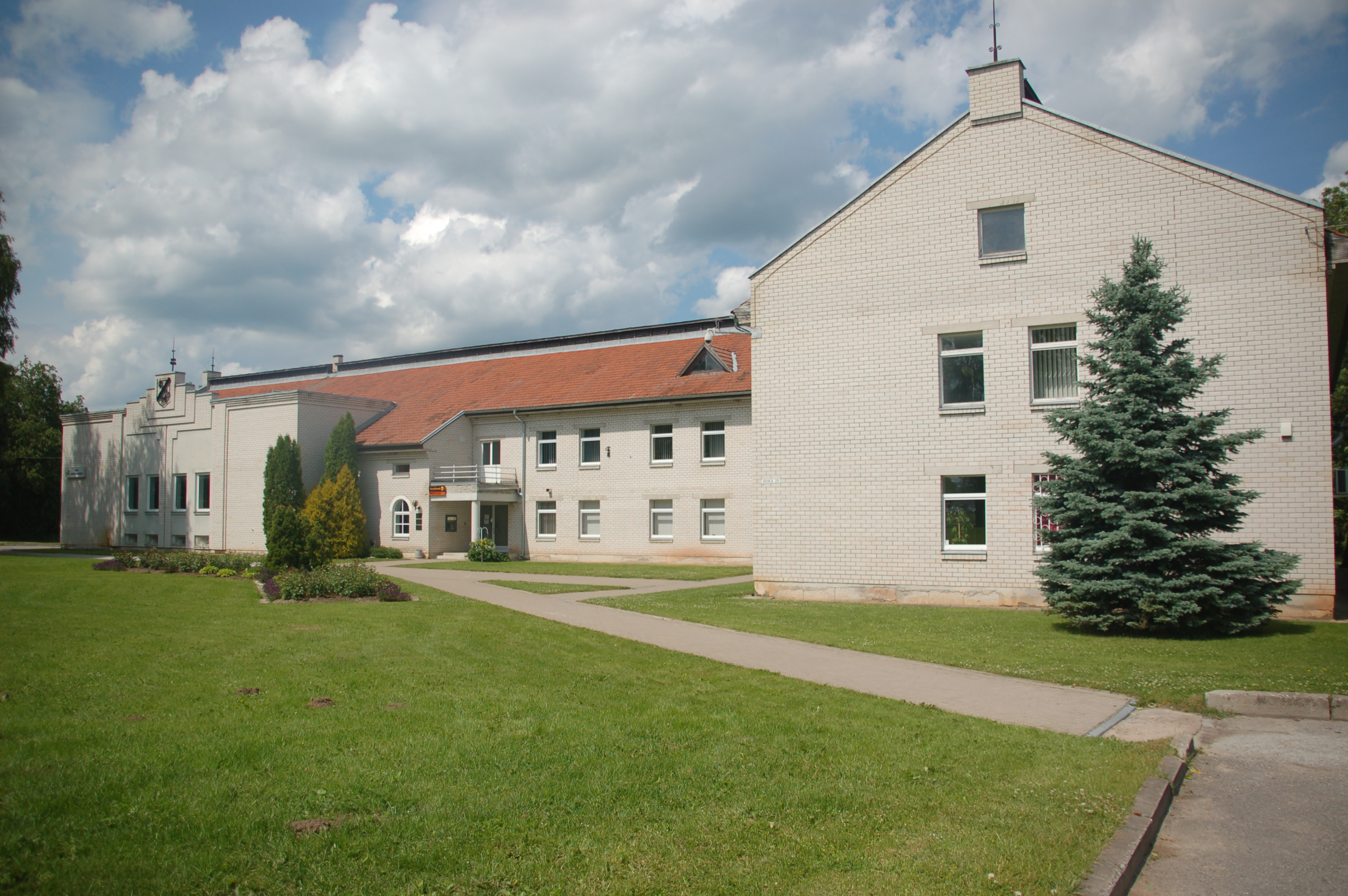 Nõo vallamaja, kus asub Nõo raamatukogu